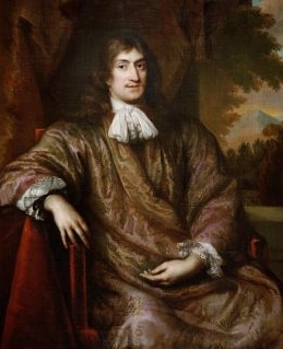 Jacob Dircksz van Foreest (1640-1708)